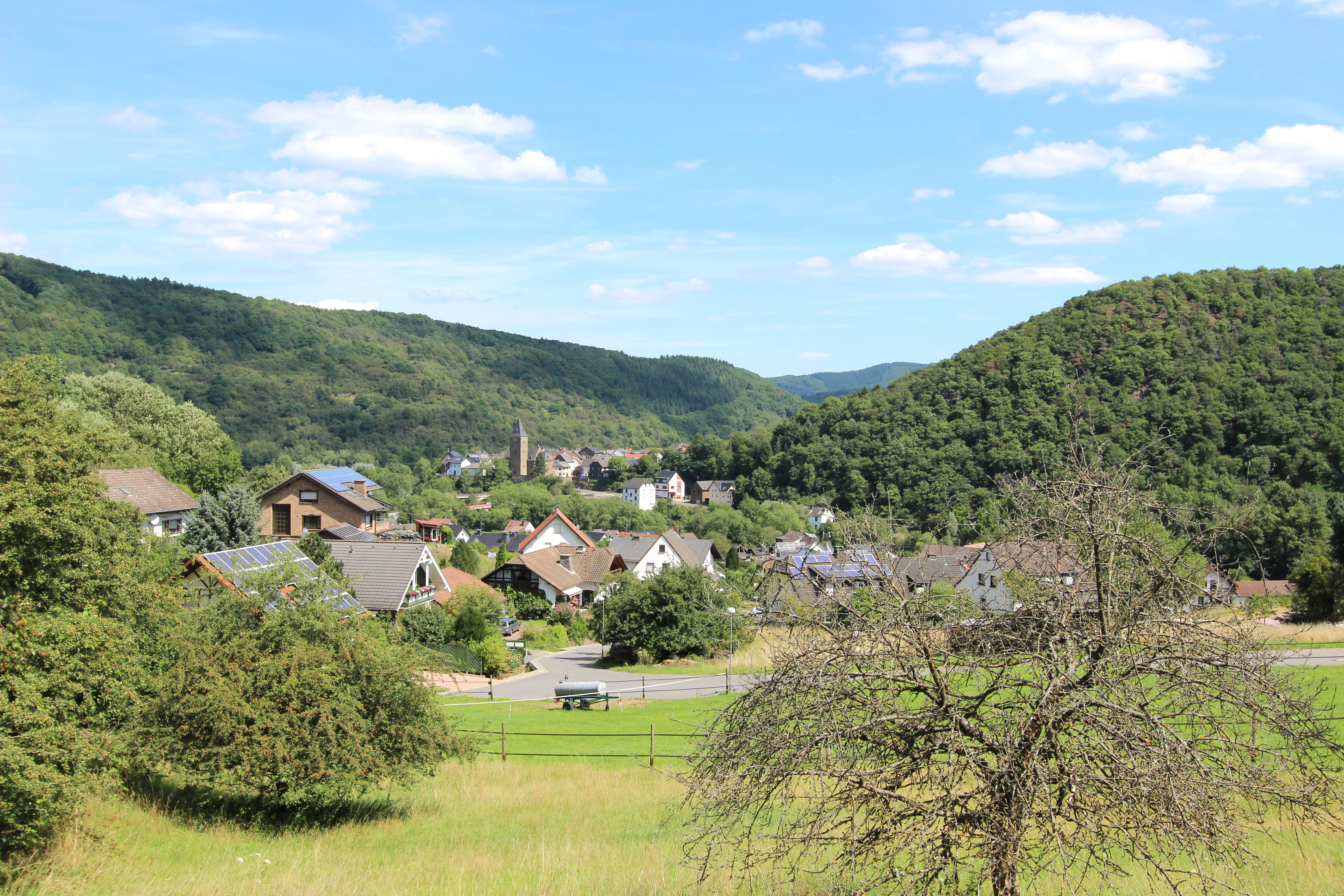 53506 Hönningen, an der B 257. Aufnahme von 2017.